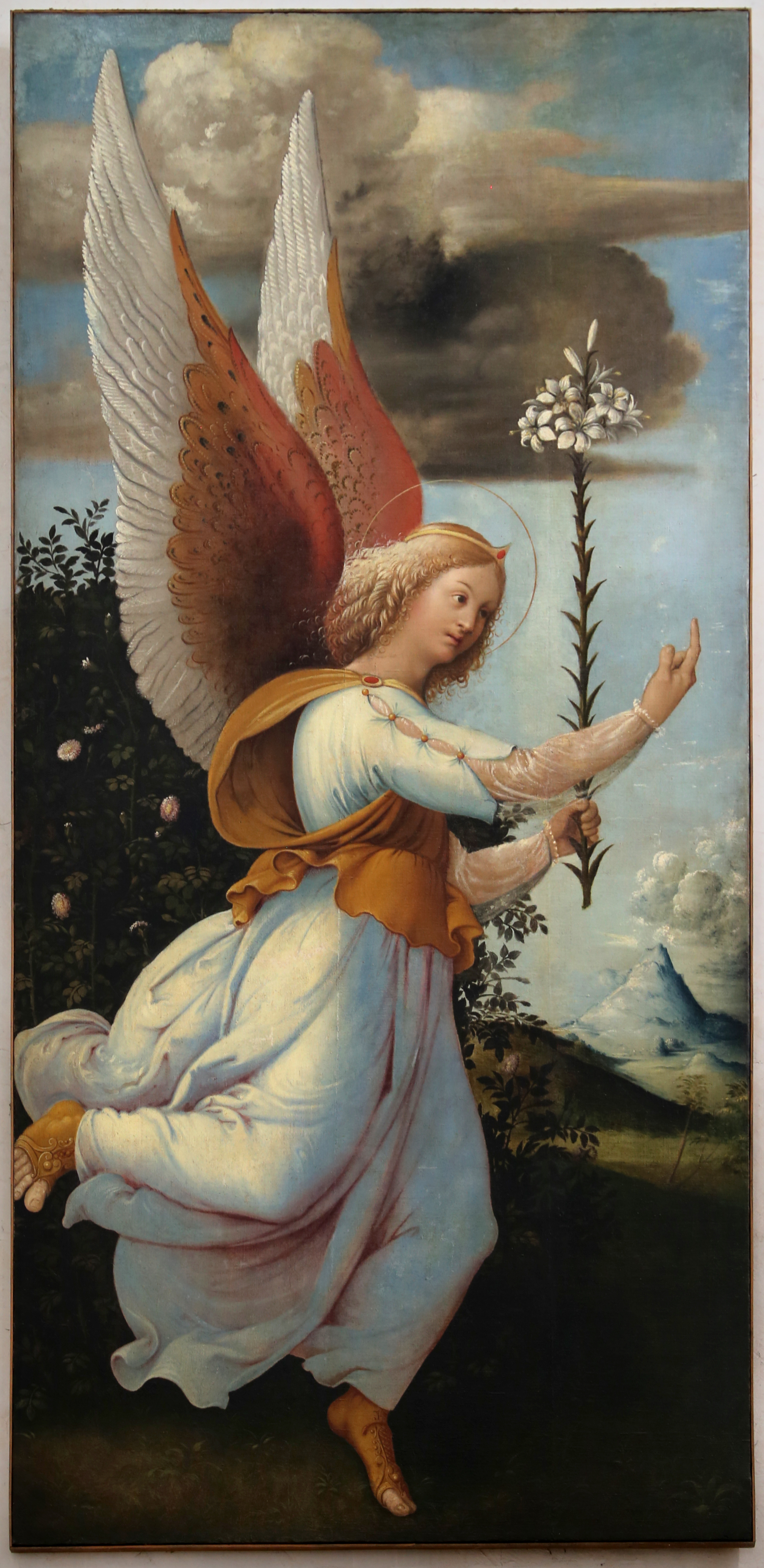 chiesa San Francesco al Corso This is a photo of a monument which is part of cultural heritage of Italy.